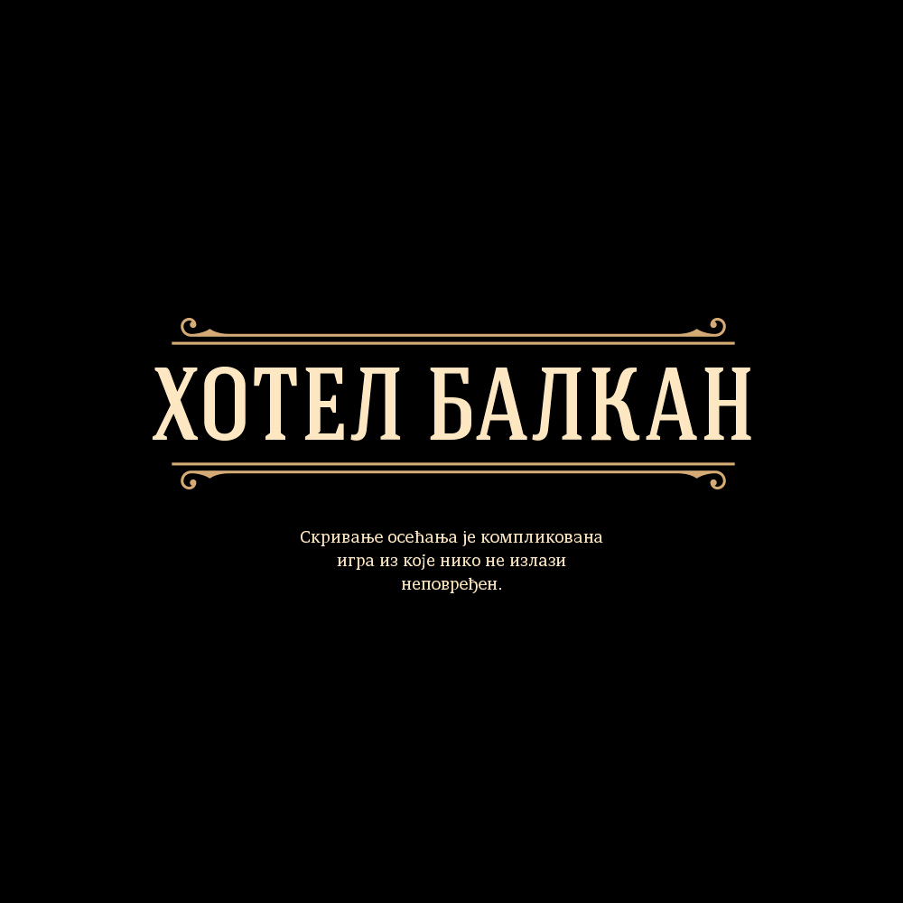 Хотел Балкан